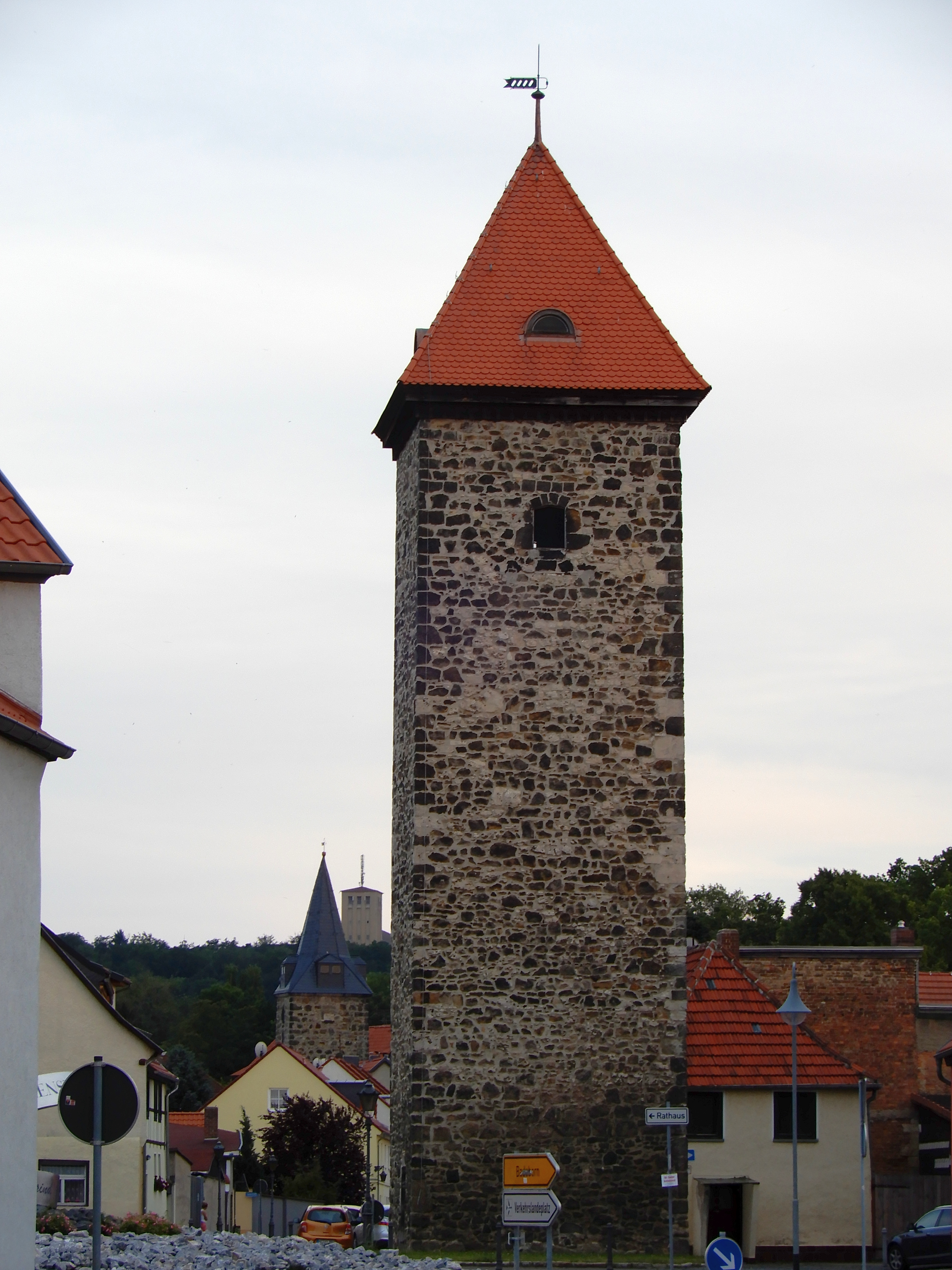 Unterturm Ballenstedt, im Hintergrund der Marktturm und der Turm des Schulungszentrums auf dem Großen Ziegenberg